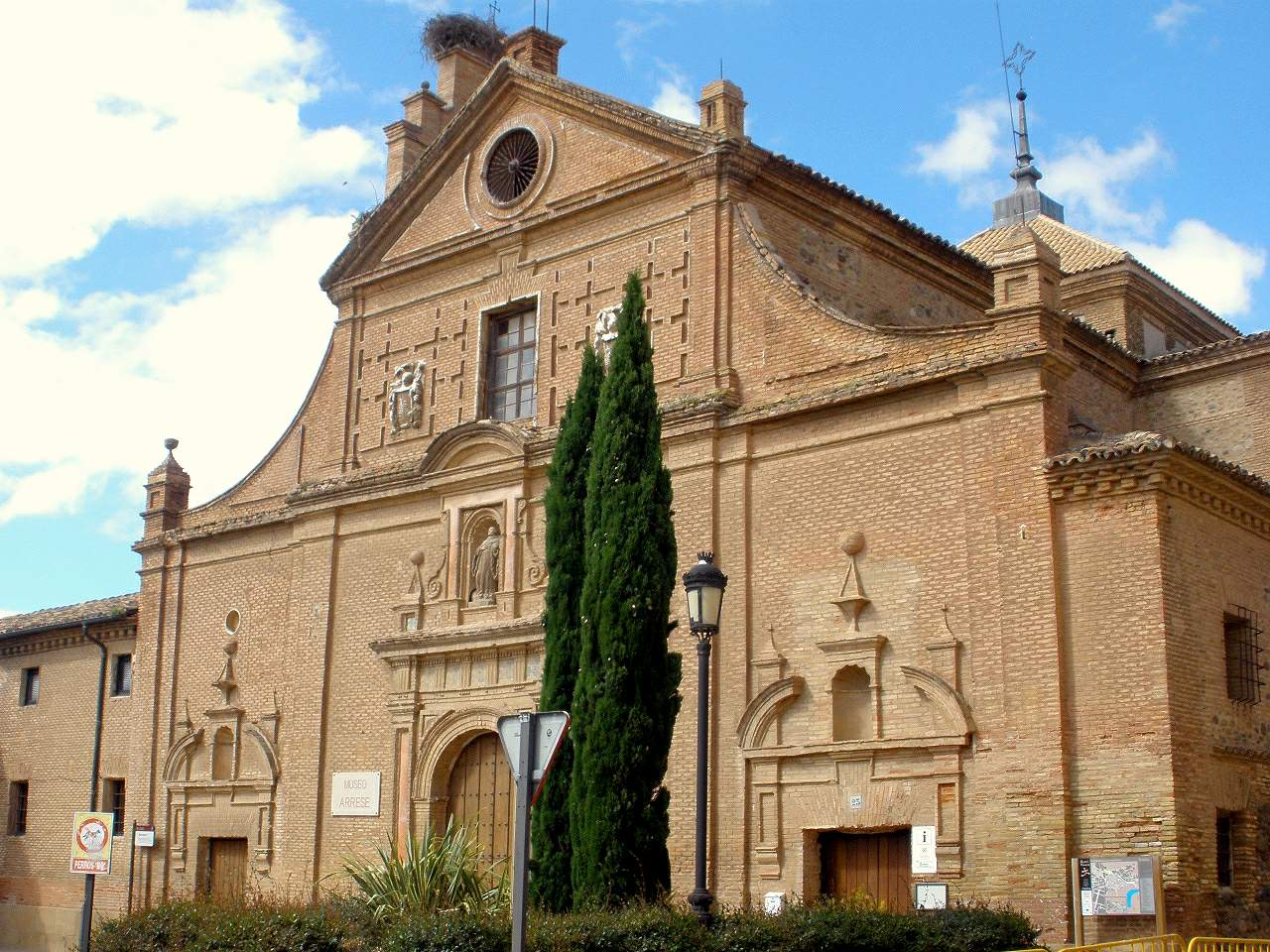 Antiguo Convento de la Encarnación, de monjas benedictinas, hoy Museo Arrese de arte sacro, en Corella (Navarra)